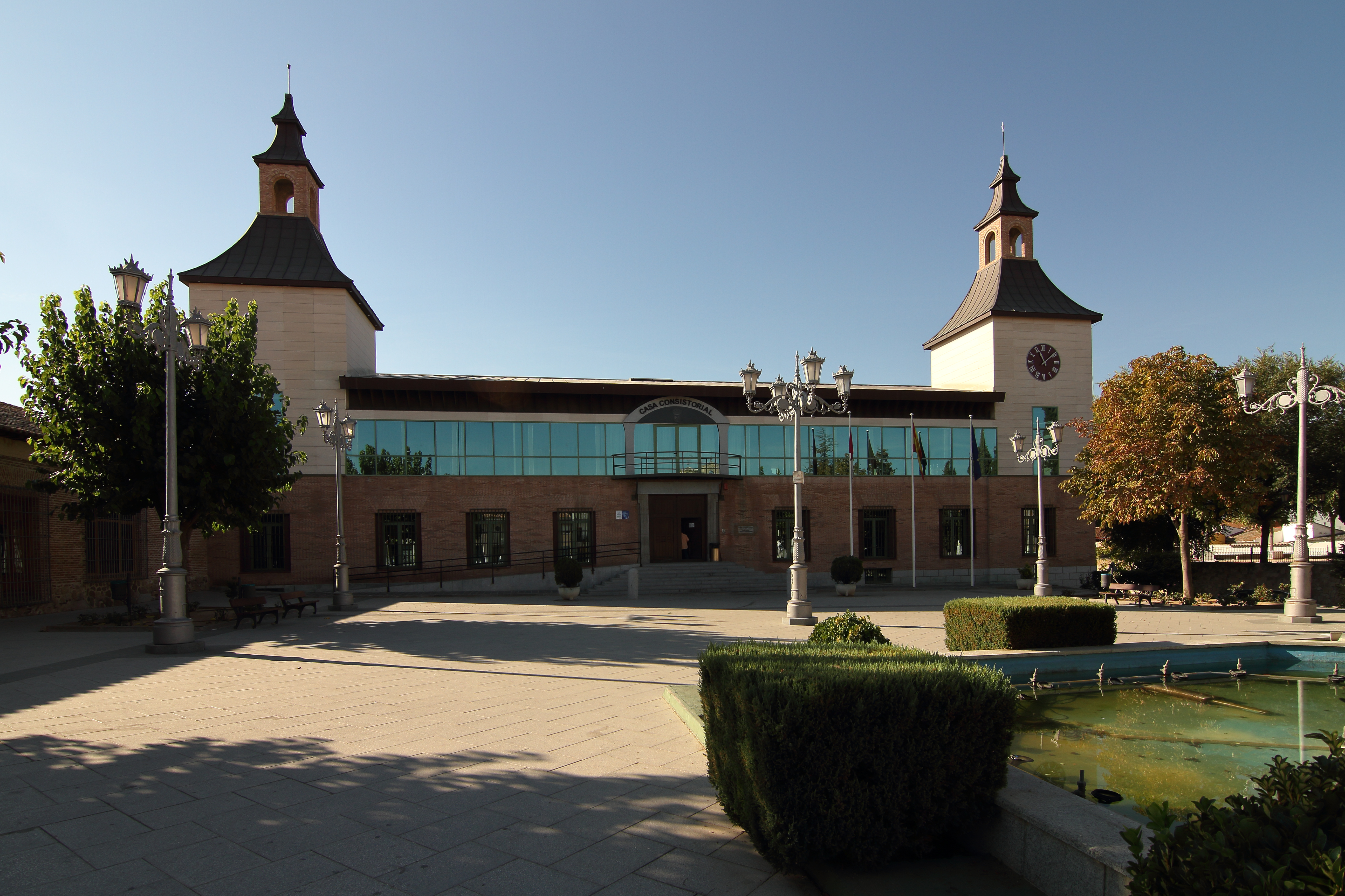 Nuevo ayuntamiento de Ugena sobre las ruinas de la antigua casa palacio de los marqueses de Ugena